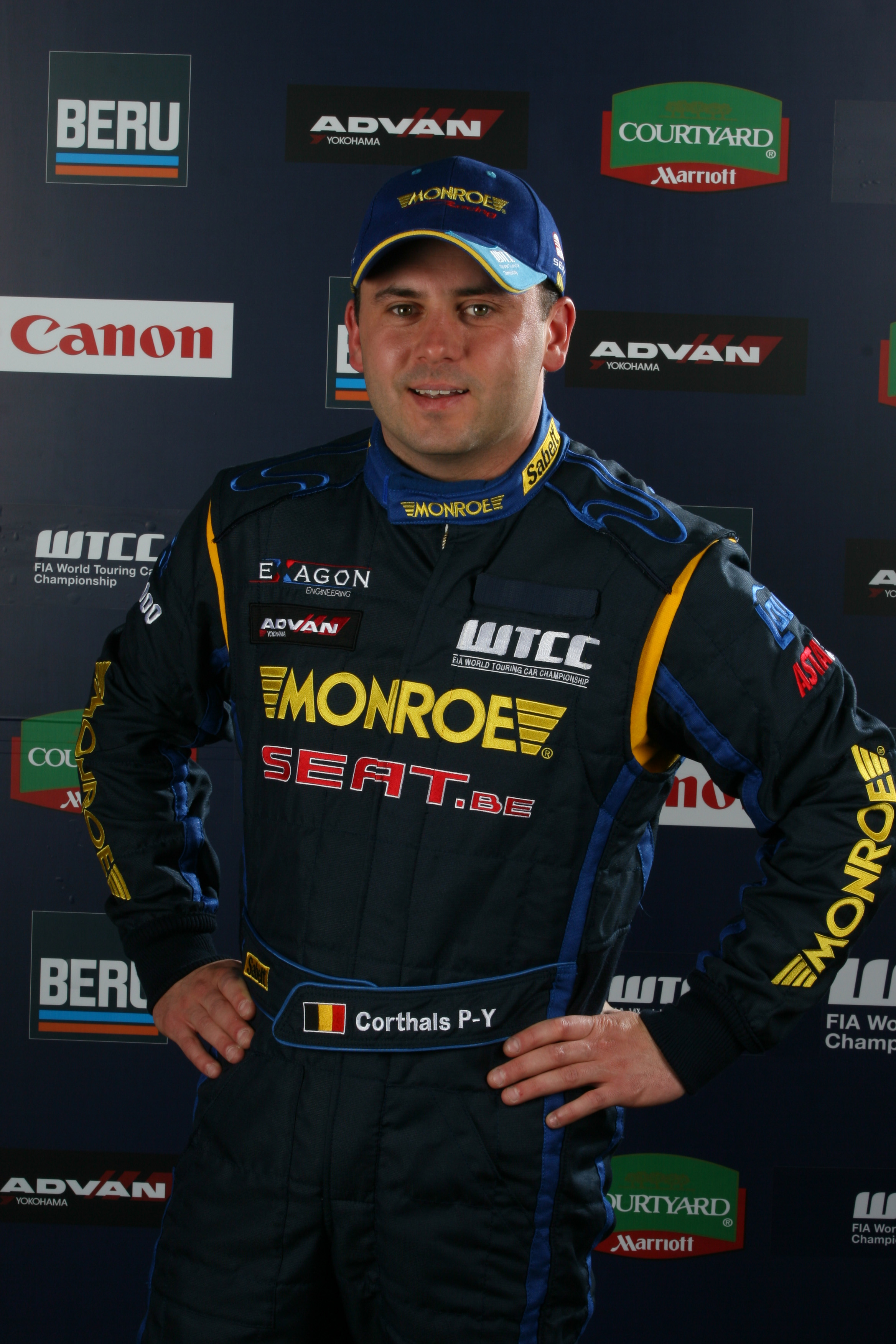 PY Corthals